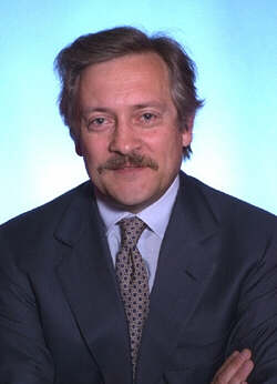 Politico italiano